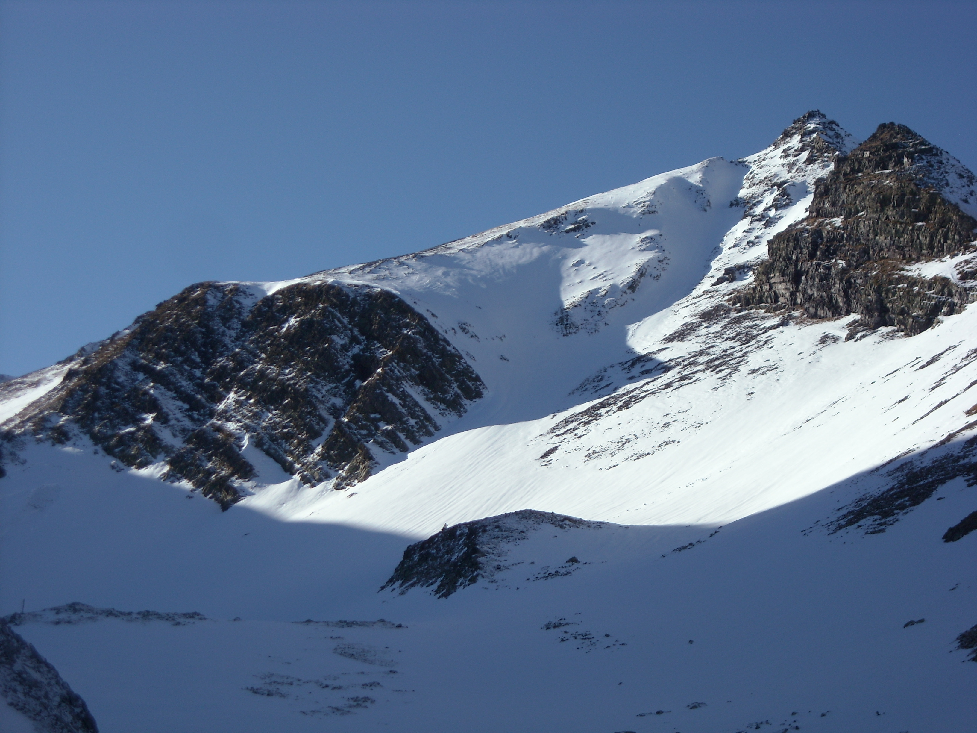 Vista del Tuc de Montanèro